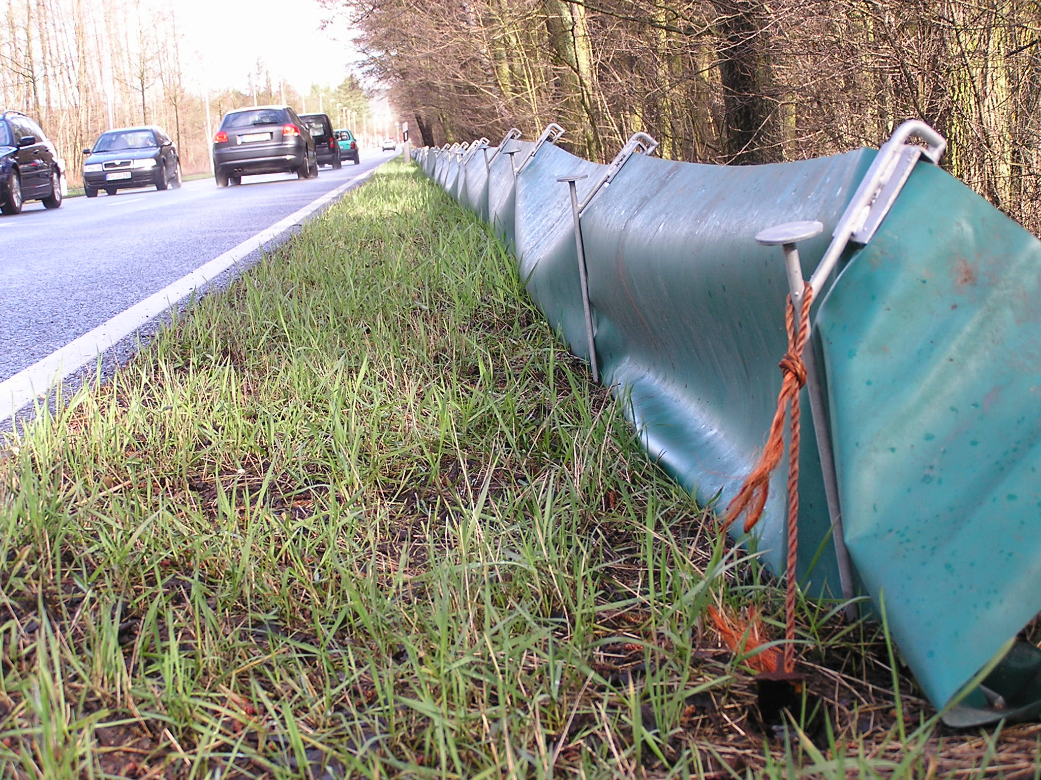 Krötenzaun entlang der Kurt-Schumacher-Straße zwischen Buckenhofer Forst und NSG Exerzierplatz in Erlangen, Deutschland.